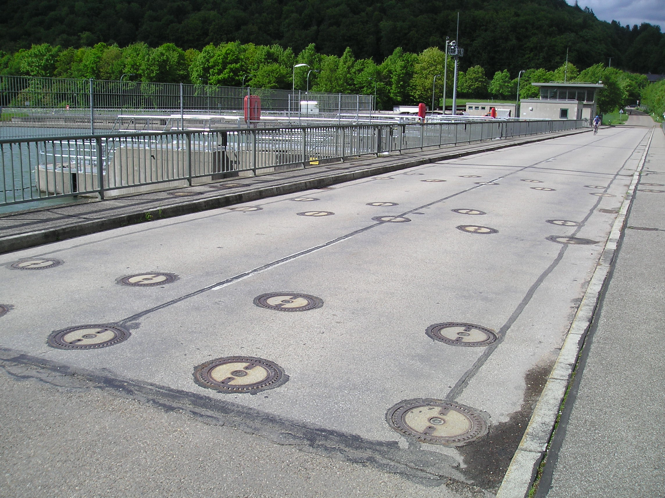 Stecksperren aus dem Kalten Krieg am südlichen Ende der Schleusenanlage Gronsdorf am Main-Donau-Kanal (Kelheim, Niederbayern) (Blick von Süden)